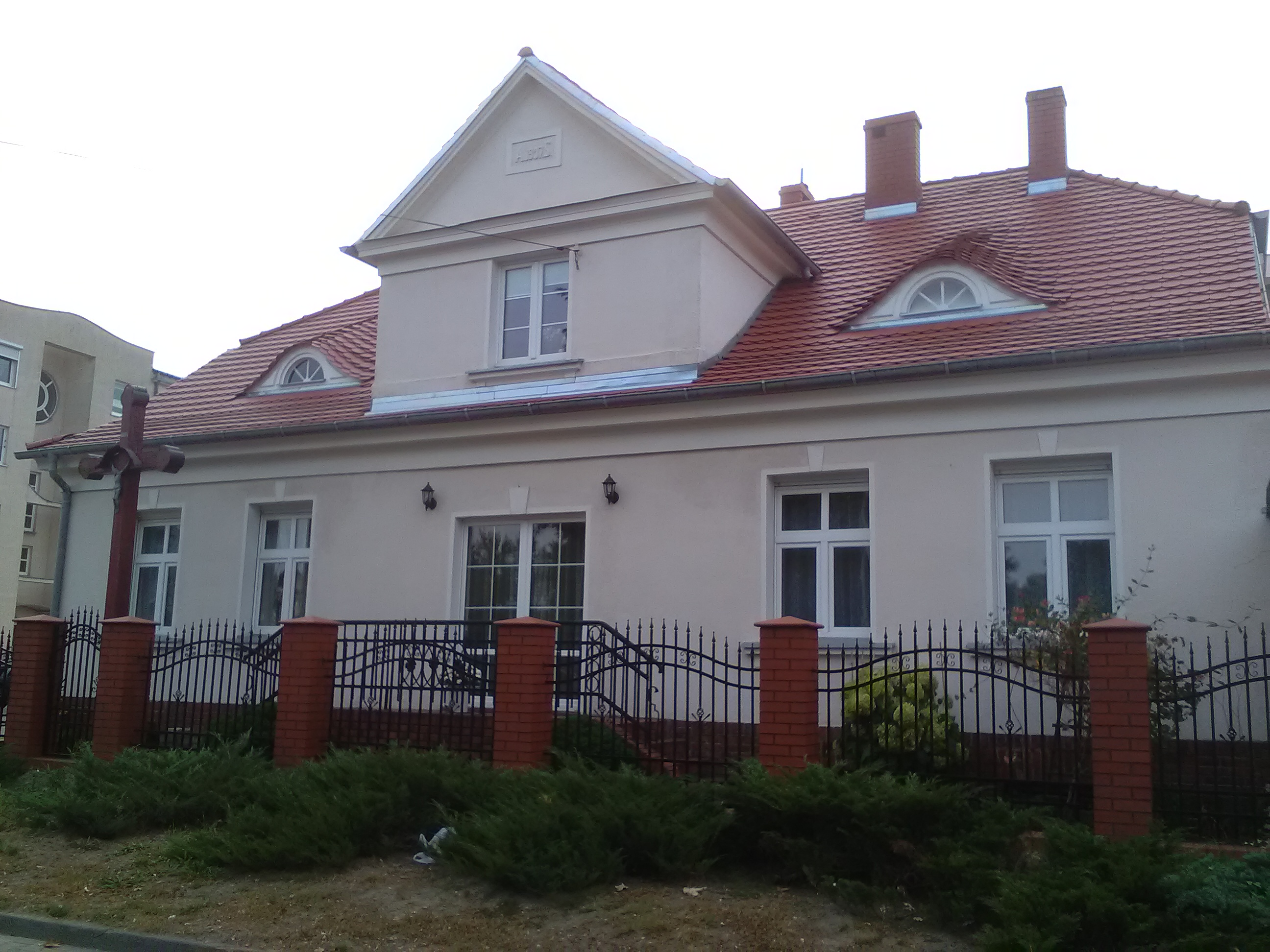 Ulica Byteńska w Poznaniu.